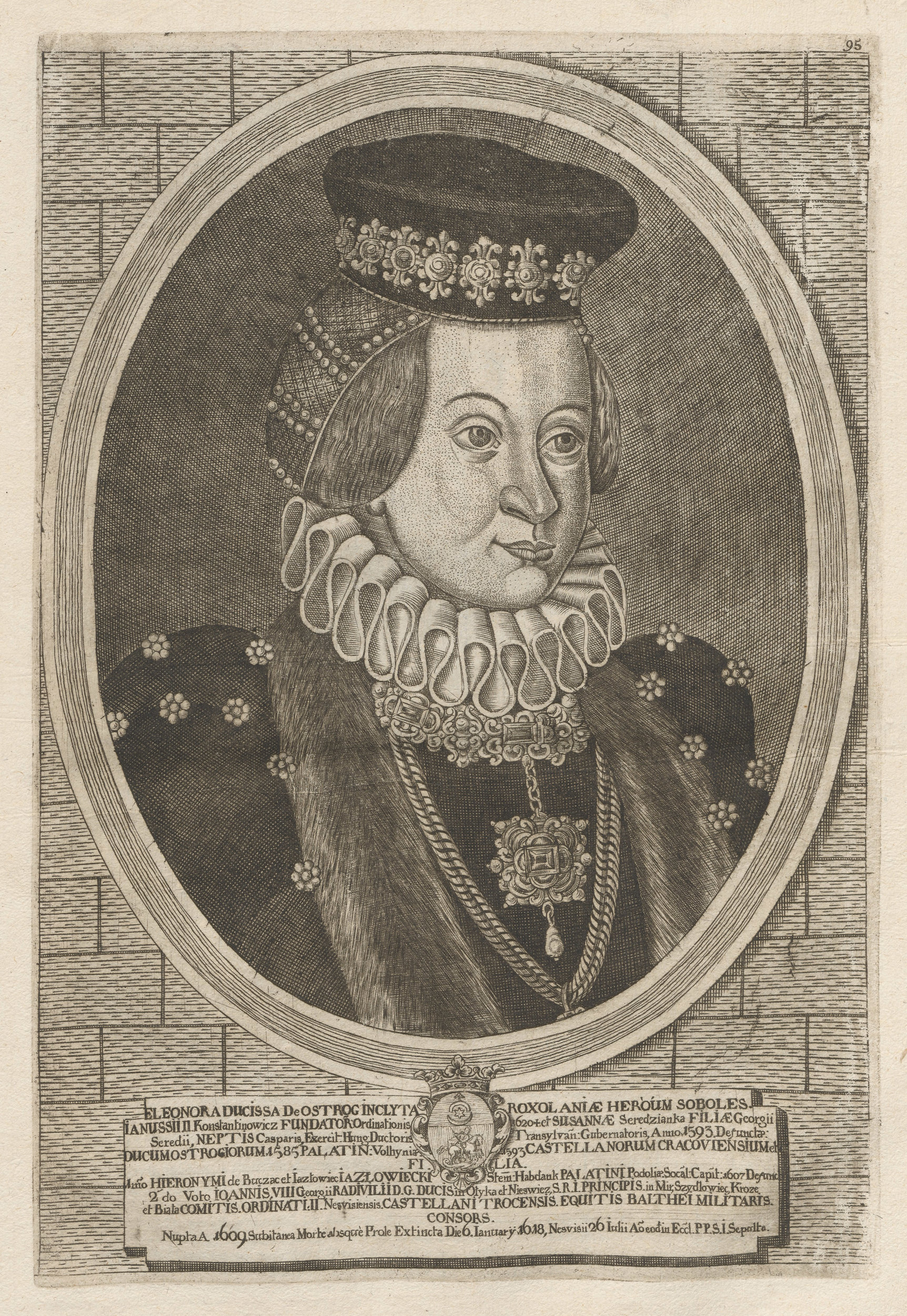 Беларуская (тарашкевіца): Партрэт Элеаноры Радзівіл (Eleanora Radzivił) з роду Астроскіх (Astroski)